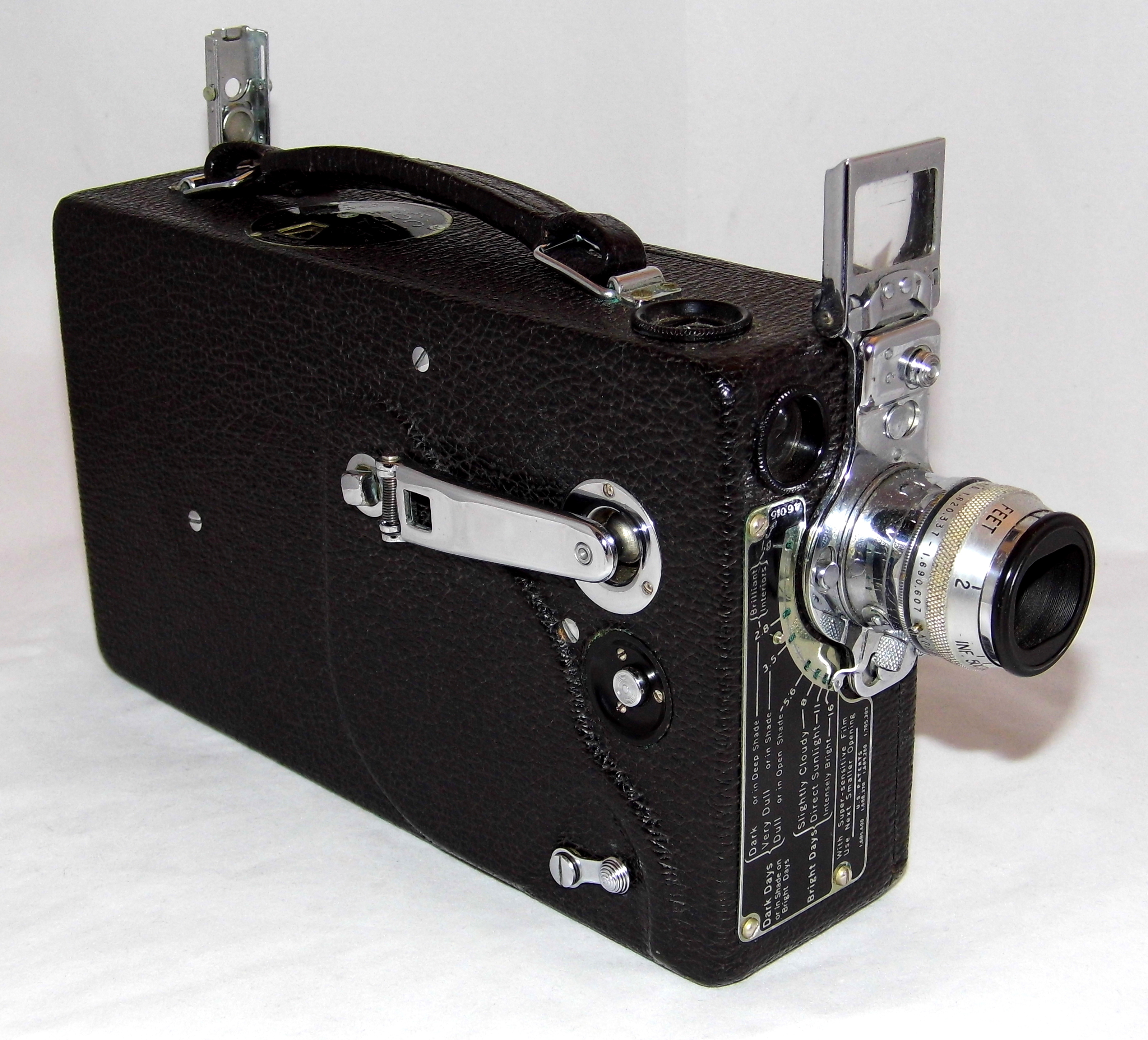 Vintage Cine-Kodak Model K 16mm Home Movie Camera, Made In USA, Circa 1930s